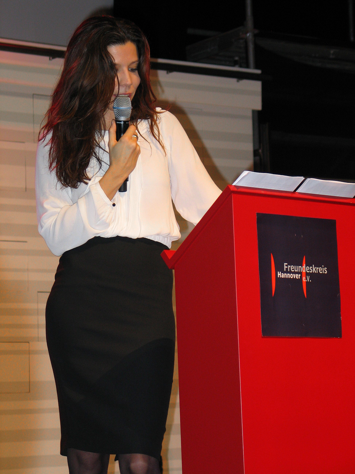 Franziska Stünkel hielt 2012 die zweite Laudatio zur Verleihung des Stadtkulturpreises Hannover ...